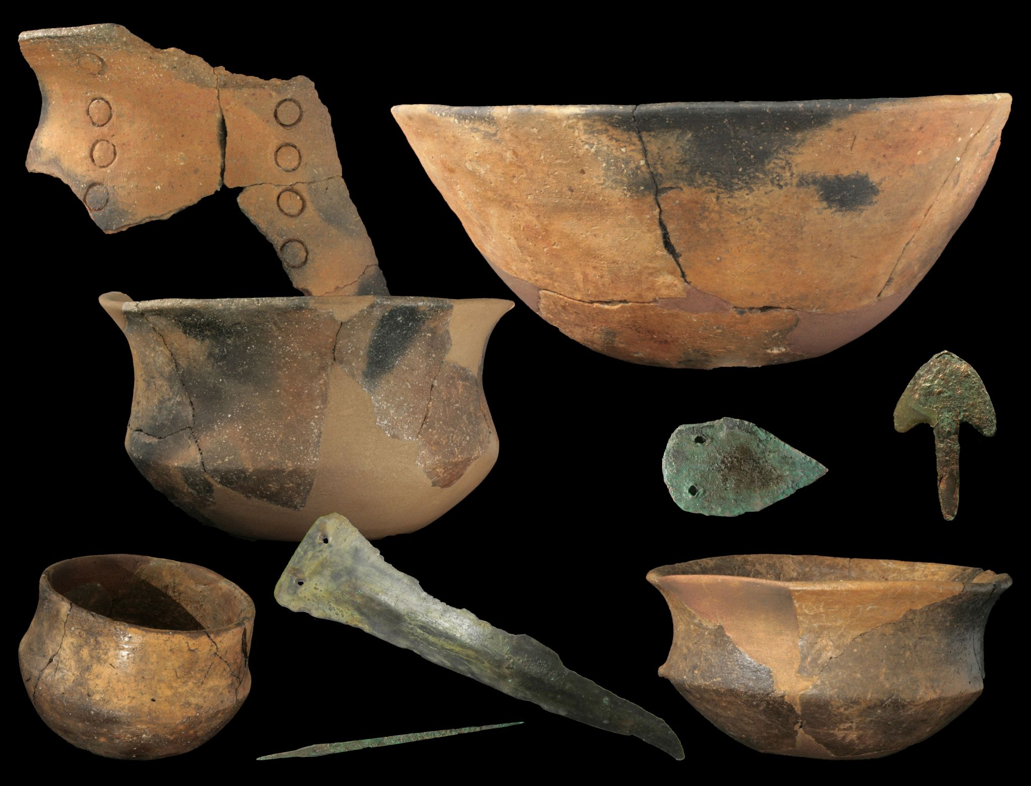 Diversos materiales del segundo milenio aC